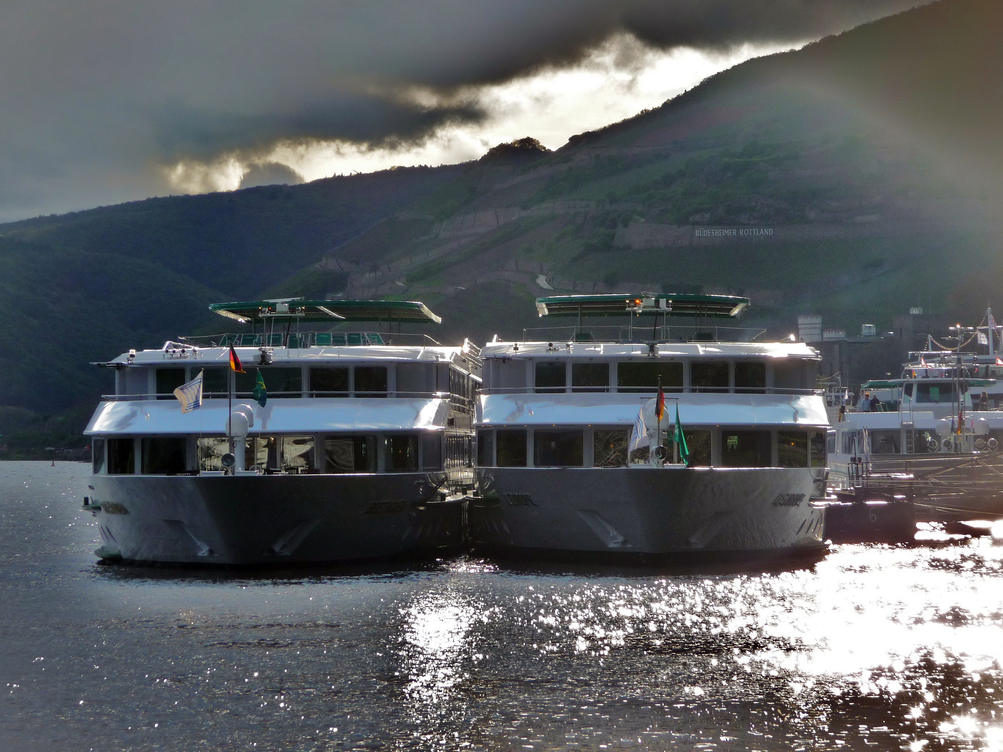 Die Kabinenfahrgstschiffe Beethoven & L'Europe gemeinsam am Anleger in Rüdesheim am Rhein